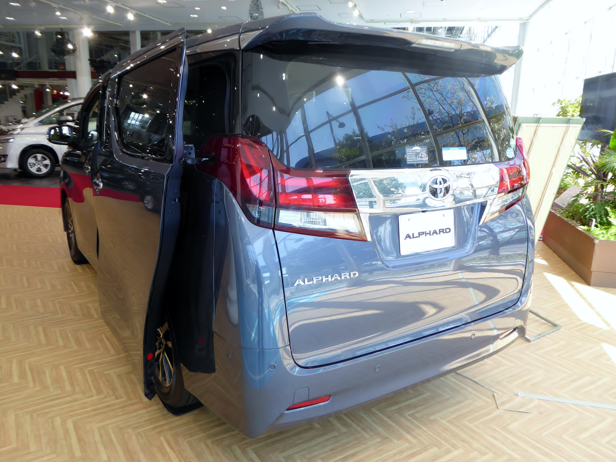 AGH30W型トヨタ・アルファードG 2WDをリアから撮影。